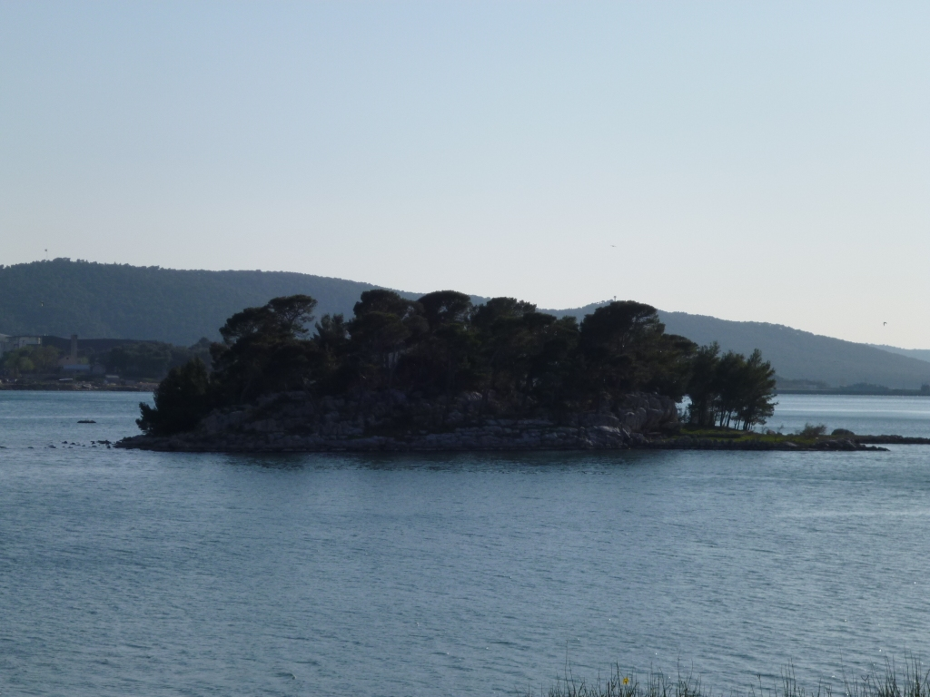 Otočić Barbarinac u Kaštelanskom zaljevu